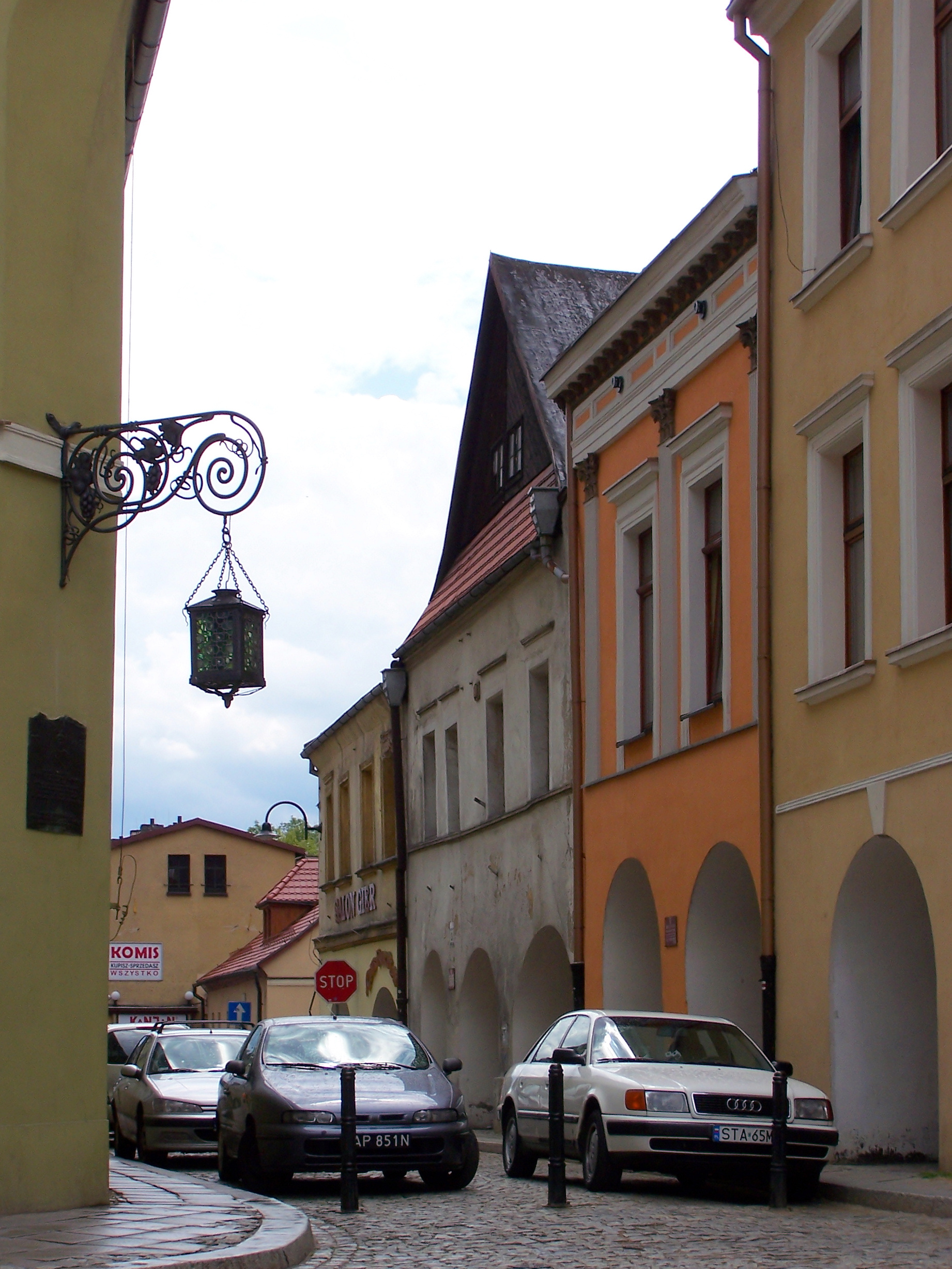 Uliczka w Tarnowskich Górach.